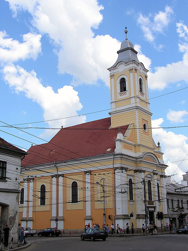 Cluj-Napoca, Biserica Evanghelică-Luterană Sinodo-Prezbiteriană (Bulev. 21 Decembrie 1989 nr.1)